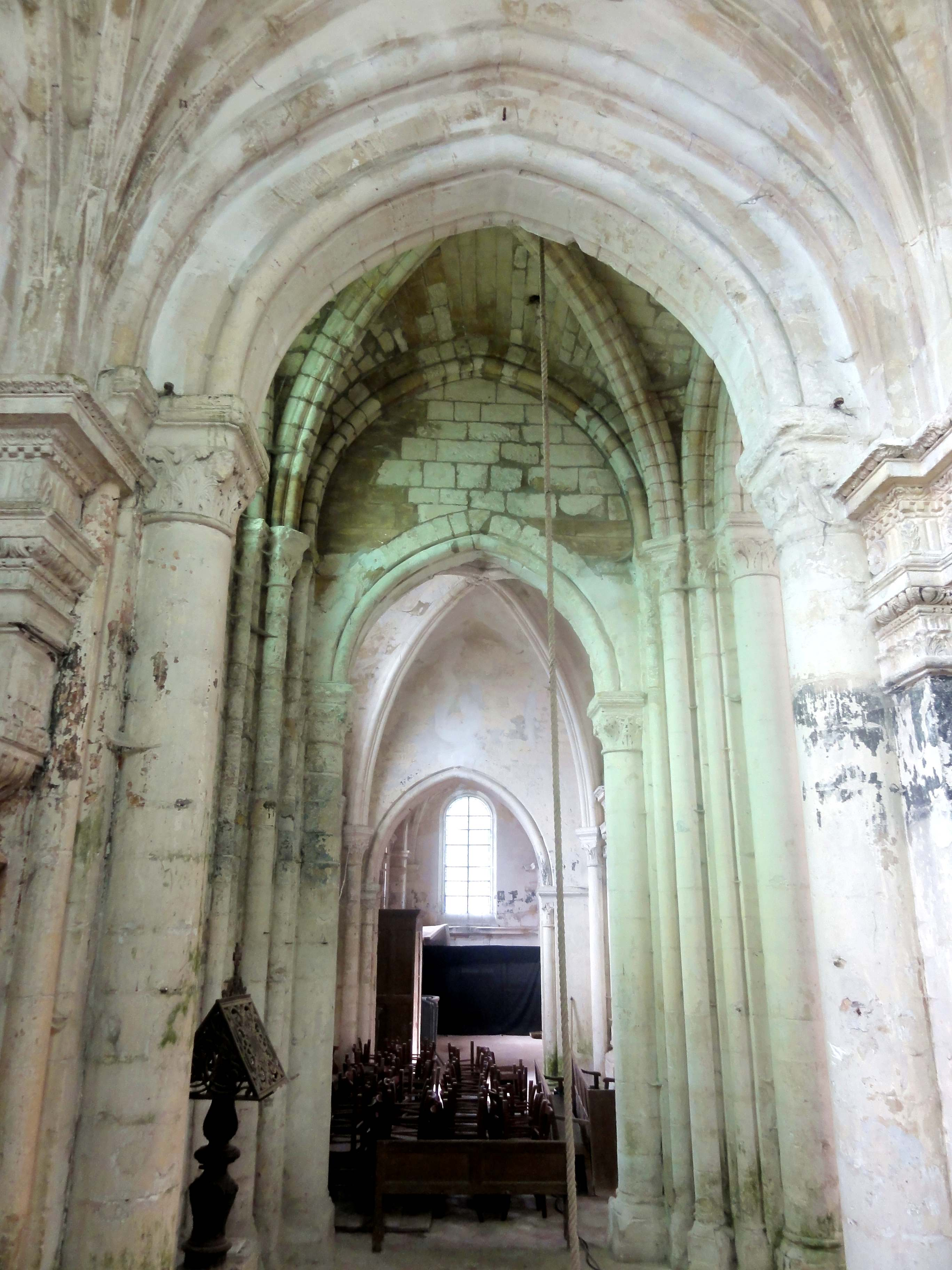 Bas-côté sud, 6e travée, vue vers l'ouest.